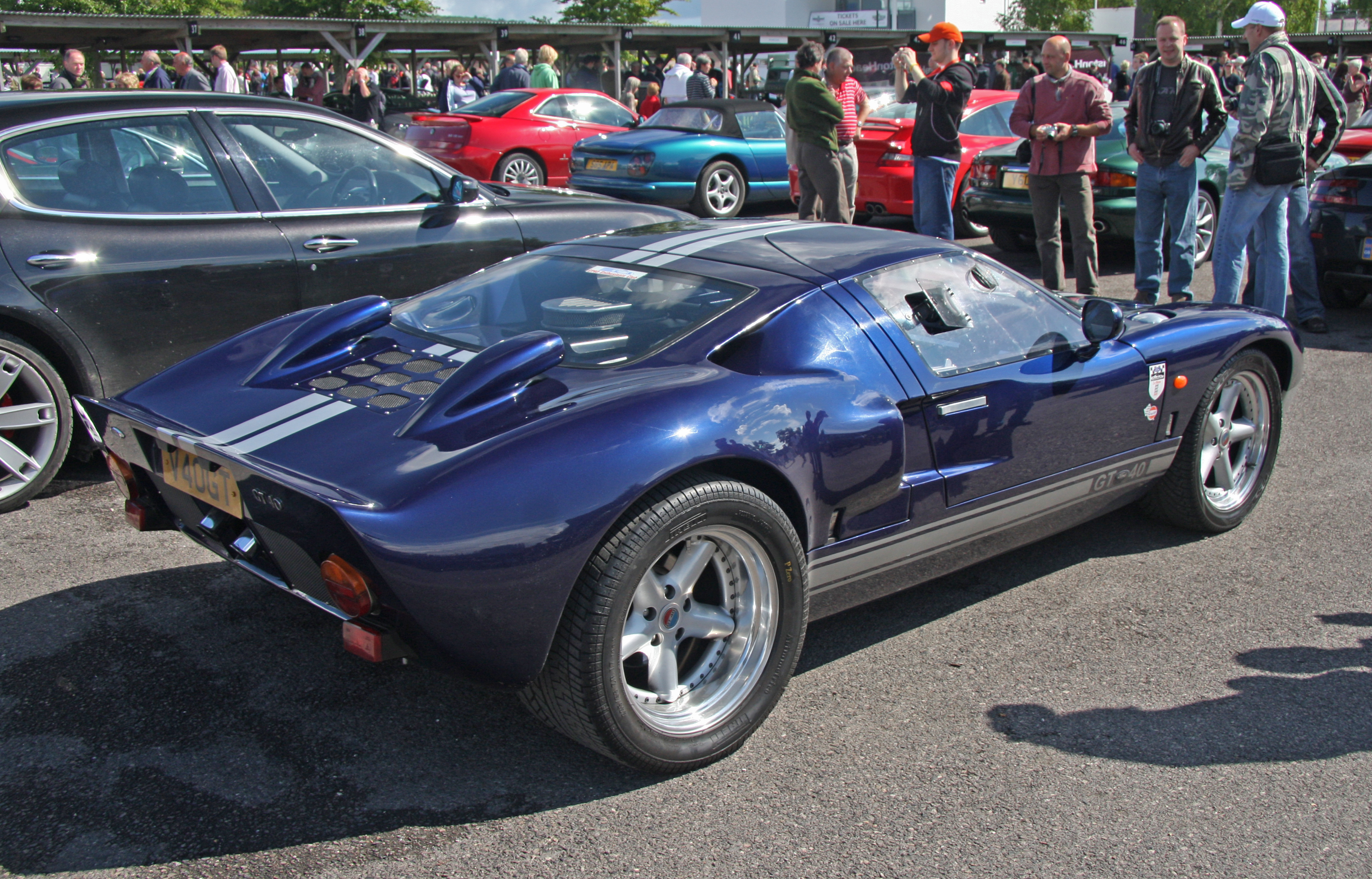 GTD 40